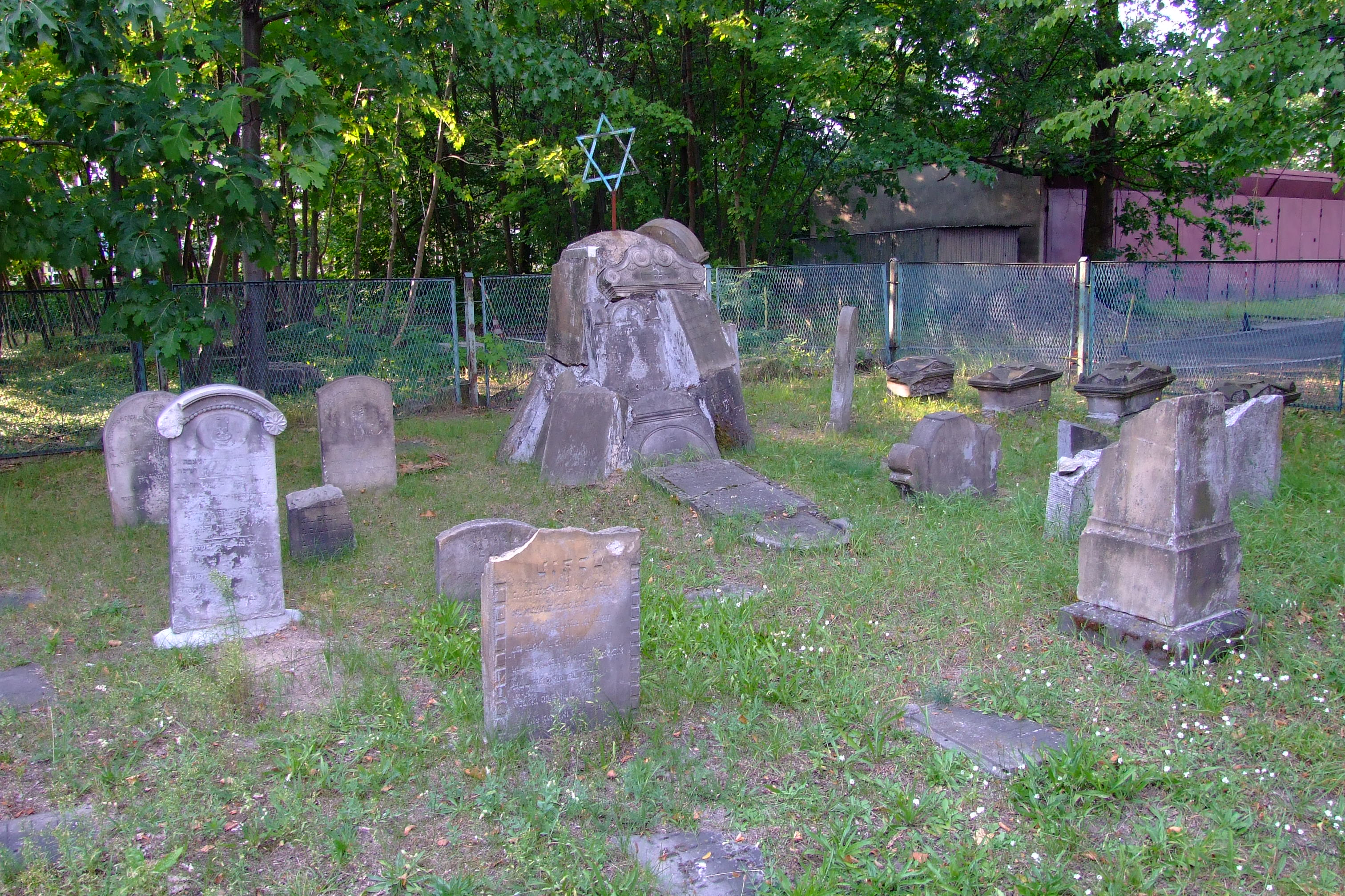 Pozostałości po cmentarzu żydowskim w Lublińcu